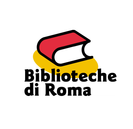 Logo storico delle Biblioteche di Roma (snapshot)